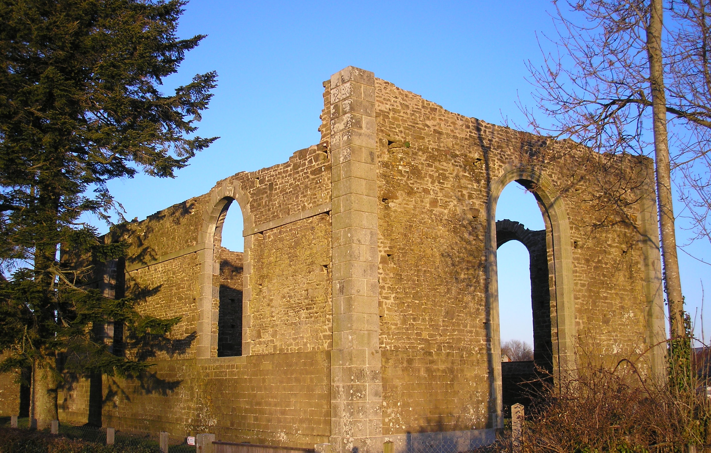 Le Chefresne (Normandie, France). Le grand temple protestant inachevé du Neufbourg.